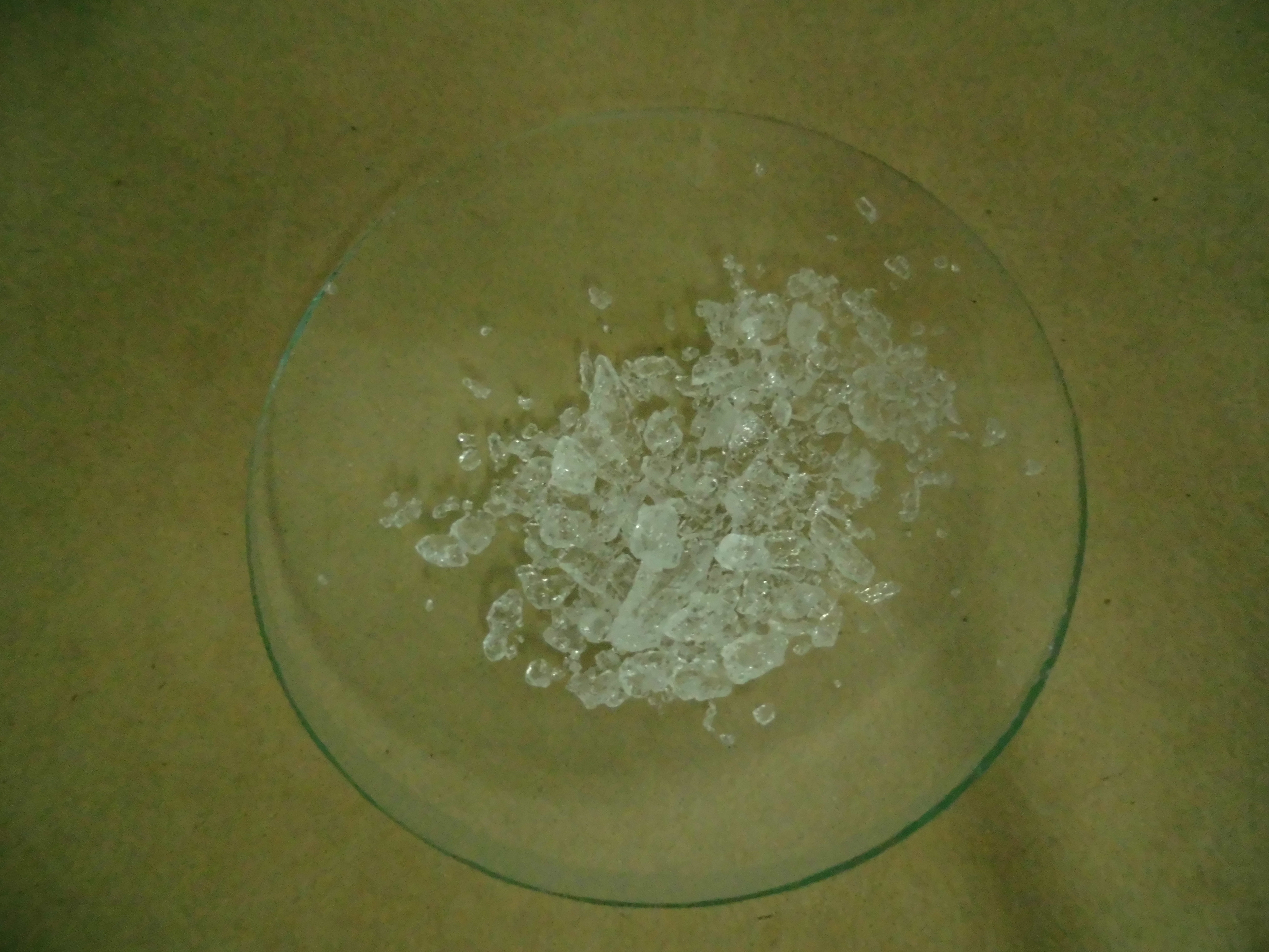 硝酸铋(III)五水合物，分析纯，含量≥99.0%。